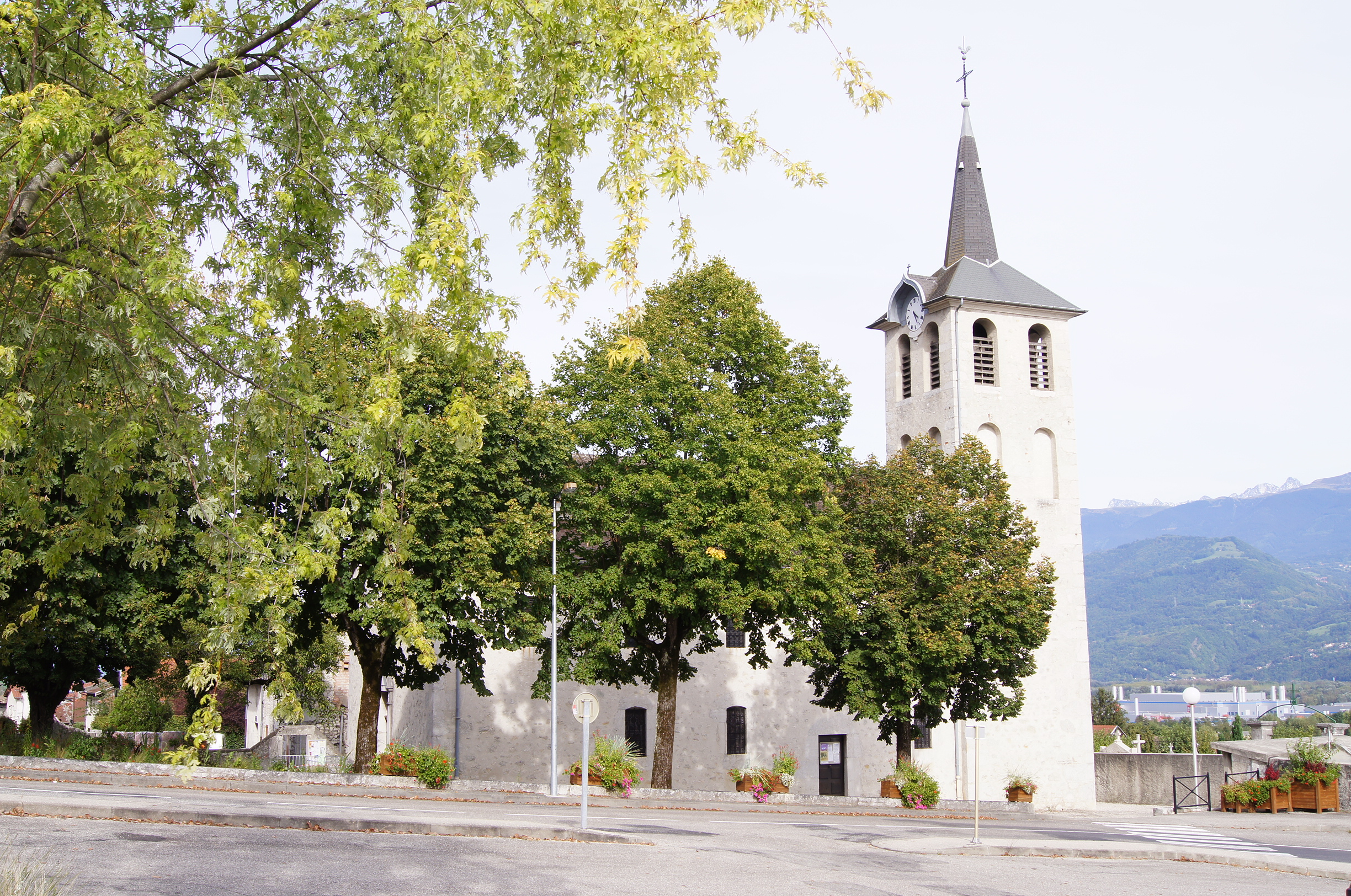 L'Eglise